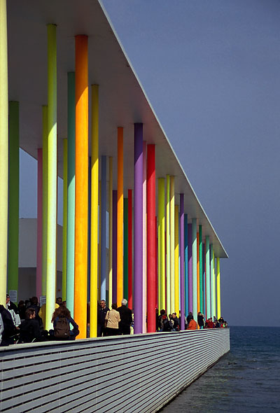 Expo 02 in Yverdon-les-Bains: Ausstellung Oui! (inzwischen wieder abgebrochen)